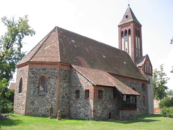 Kirche Gröben, Brandenburg Selbst fotografiert, August 2004 GNU FDL